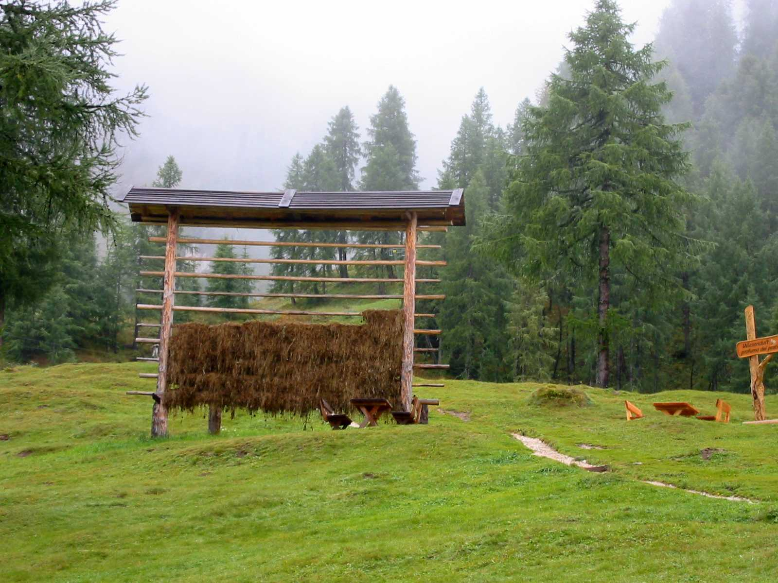 Foto scattata in settembre 2004 da Fantasy :-)